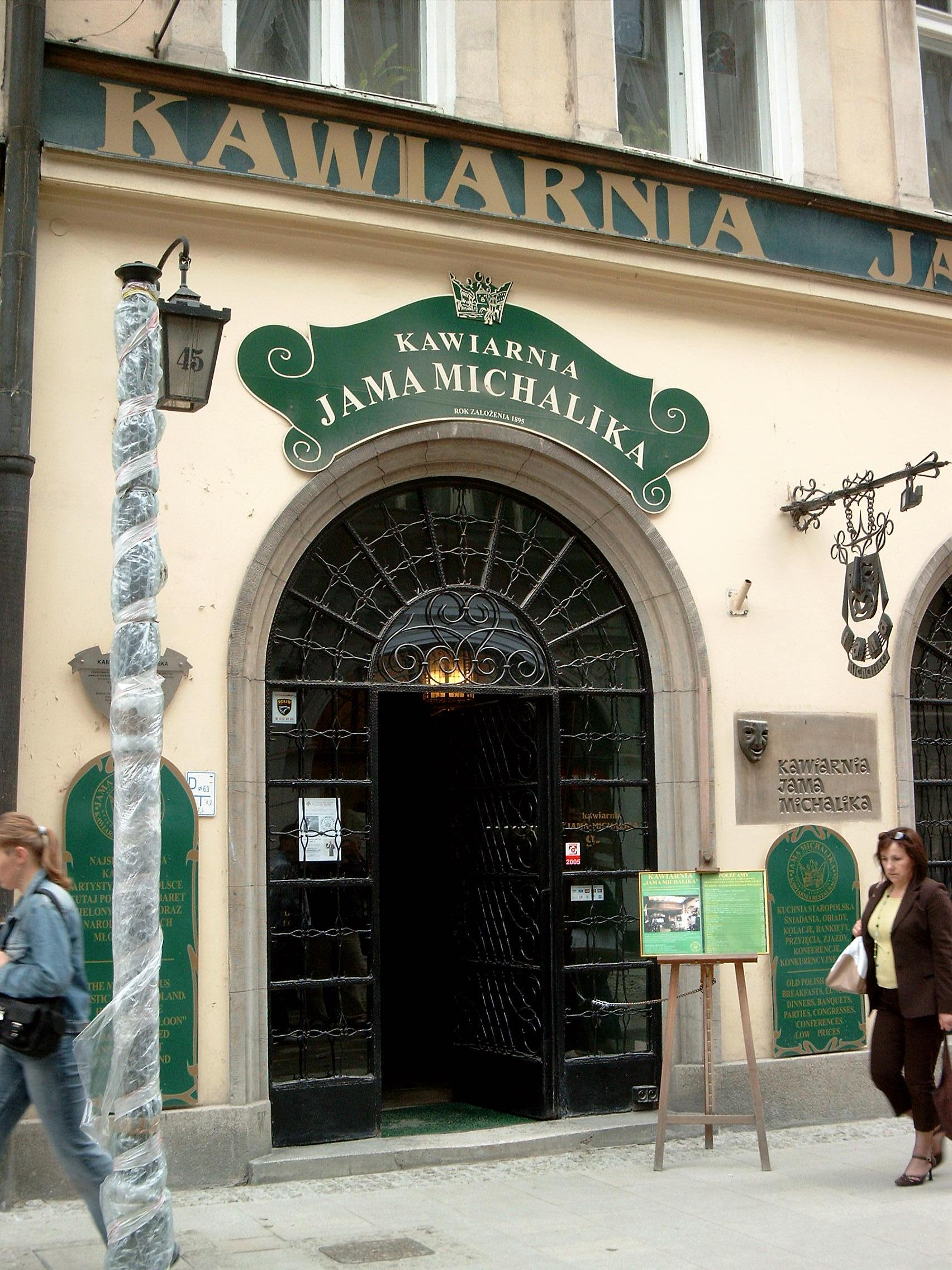 Jama Michalika w Krakowie